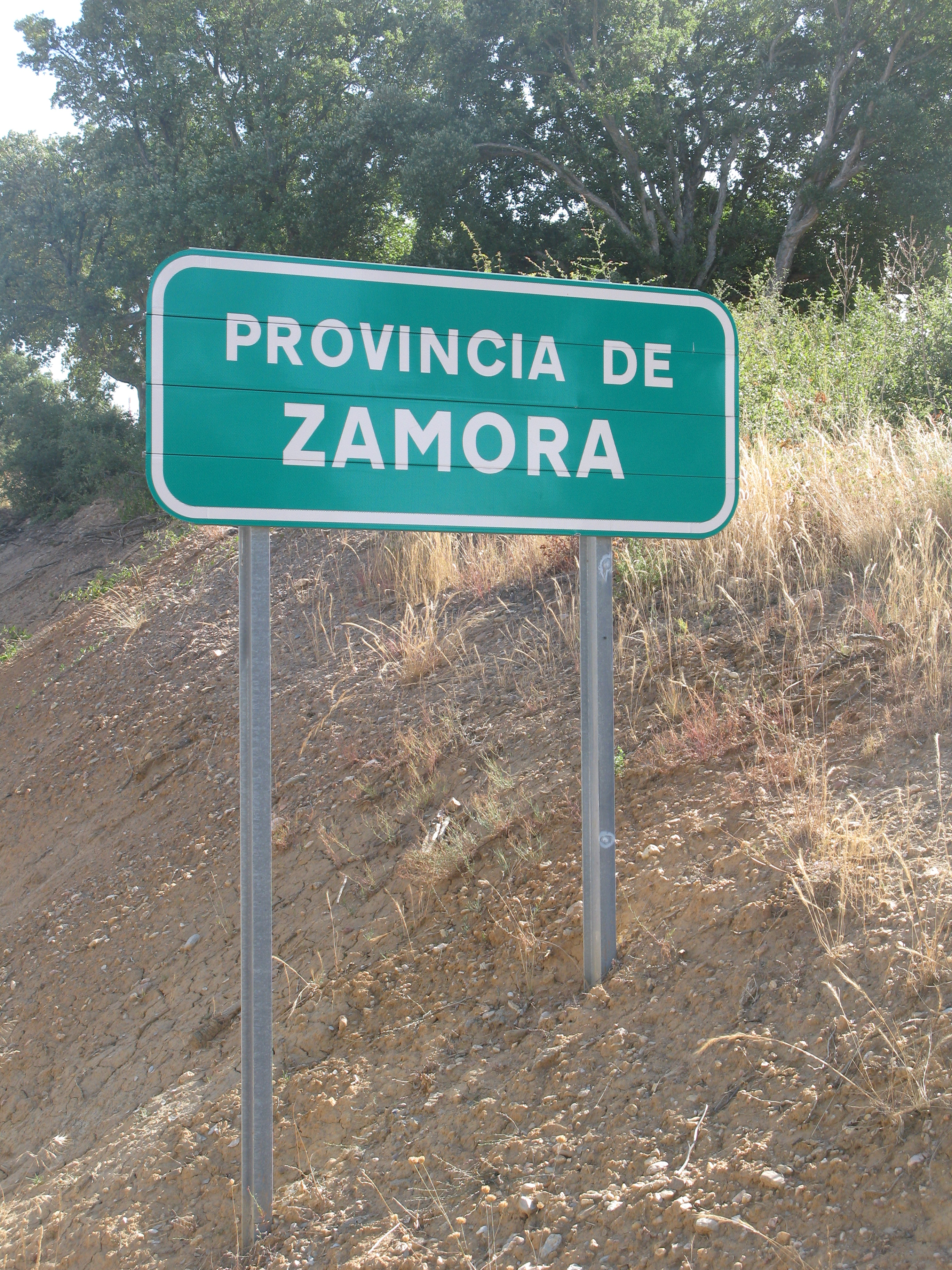 Señal de tráfico: provincia de Zamora